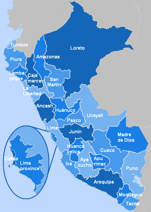 Map peru 1st level administrative divisions (blue scheme)